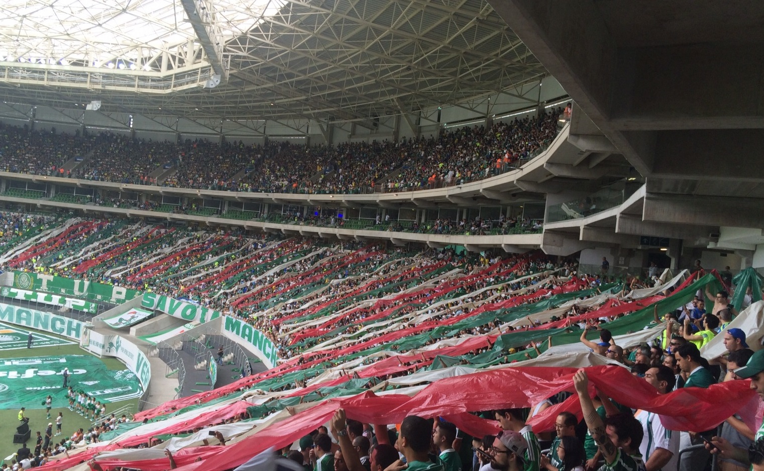 Torcida do Palmeiras com faixas durante jogo contra o Flamengo em agosto de 2015